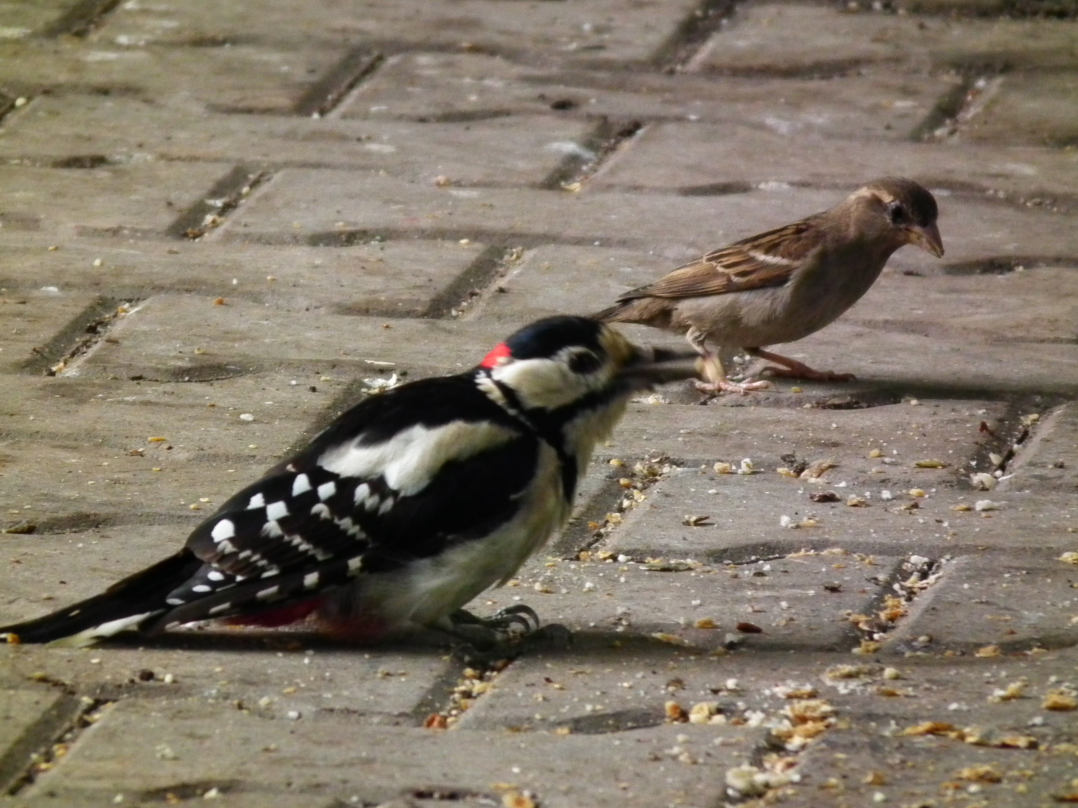 Buntspecht (Dendrocopos major) und Spatz (Passer domesticus), fotografiert in Hessen (Deutschland)